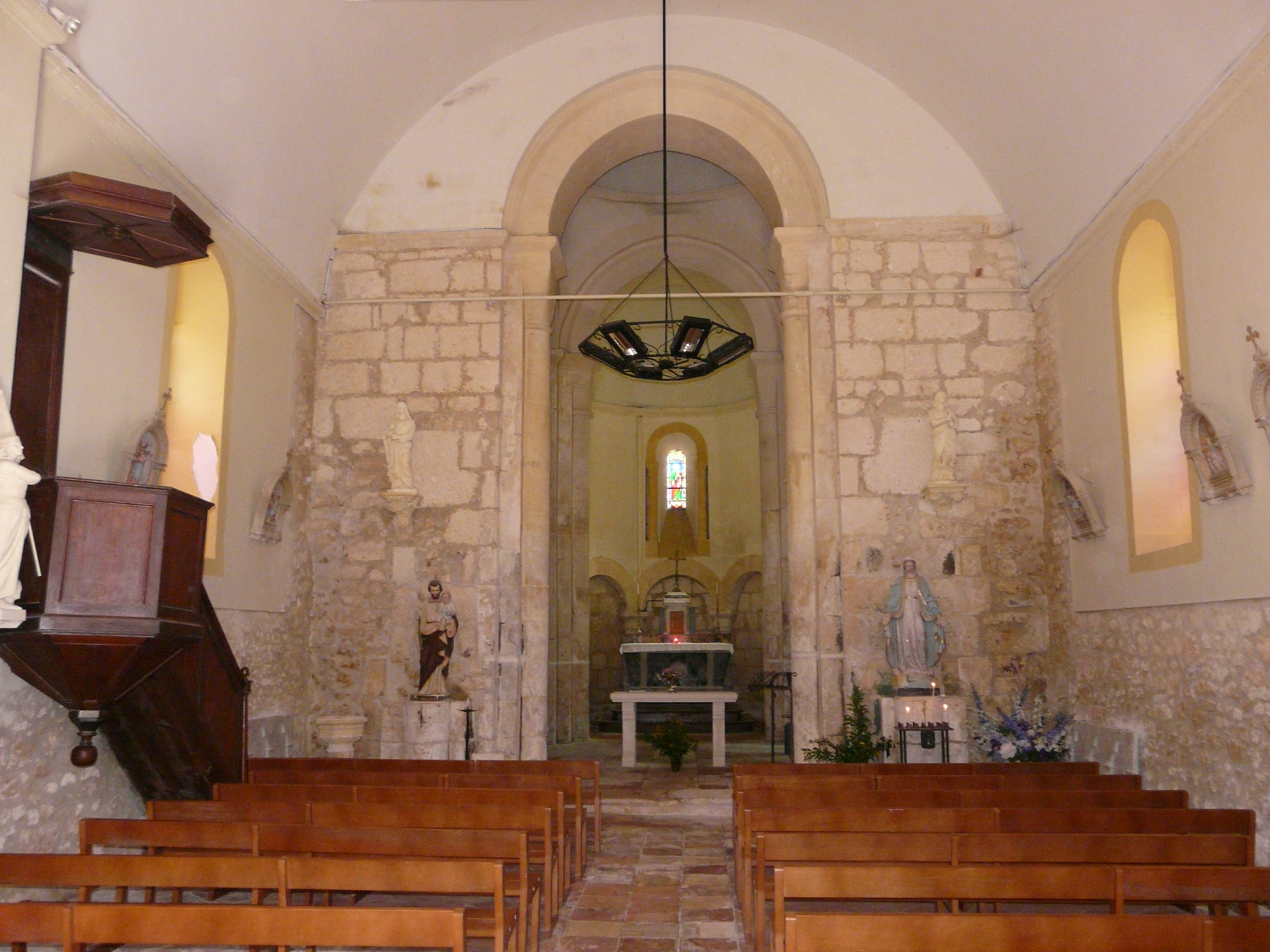 La nef de l'église Saint-Pierre-ès-Liens, Queyssac, Dordogne, France.